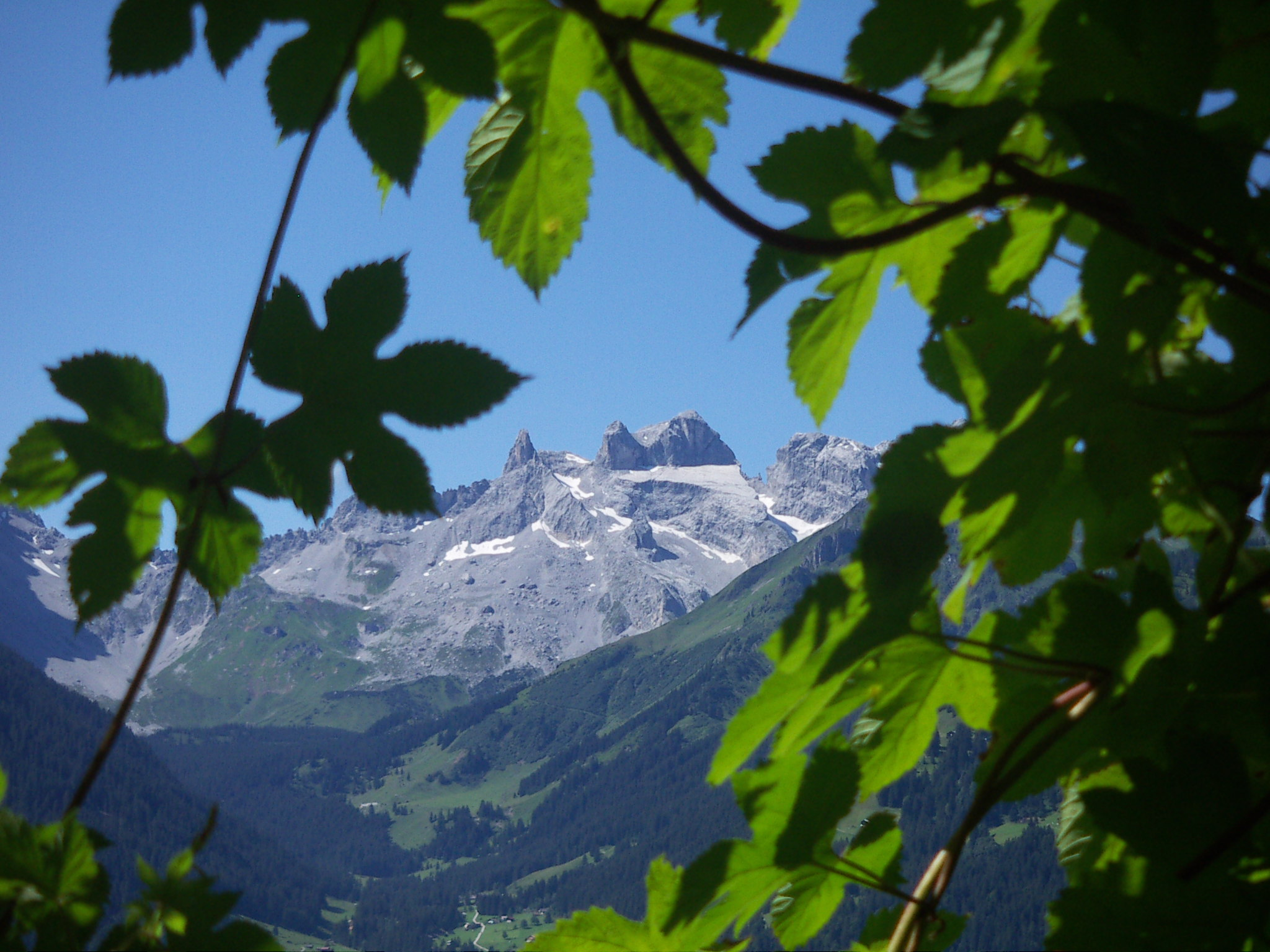 Hopfen in Bartholomäberg, Hintergrund: Drei Türme im Rätikon